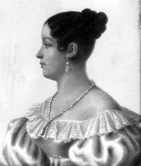 Retrato de perfil de Doña Mercedes Fontecilla (retrato en poder de doña Sara Walker de Waugh).